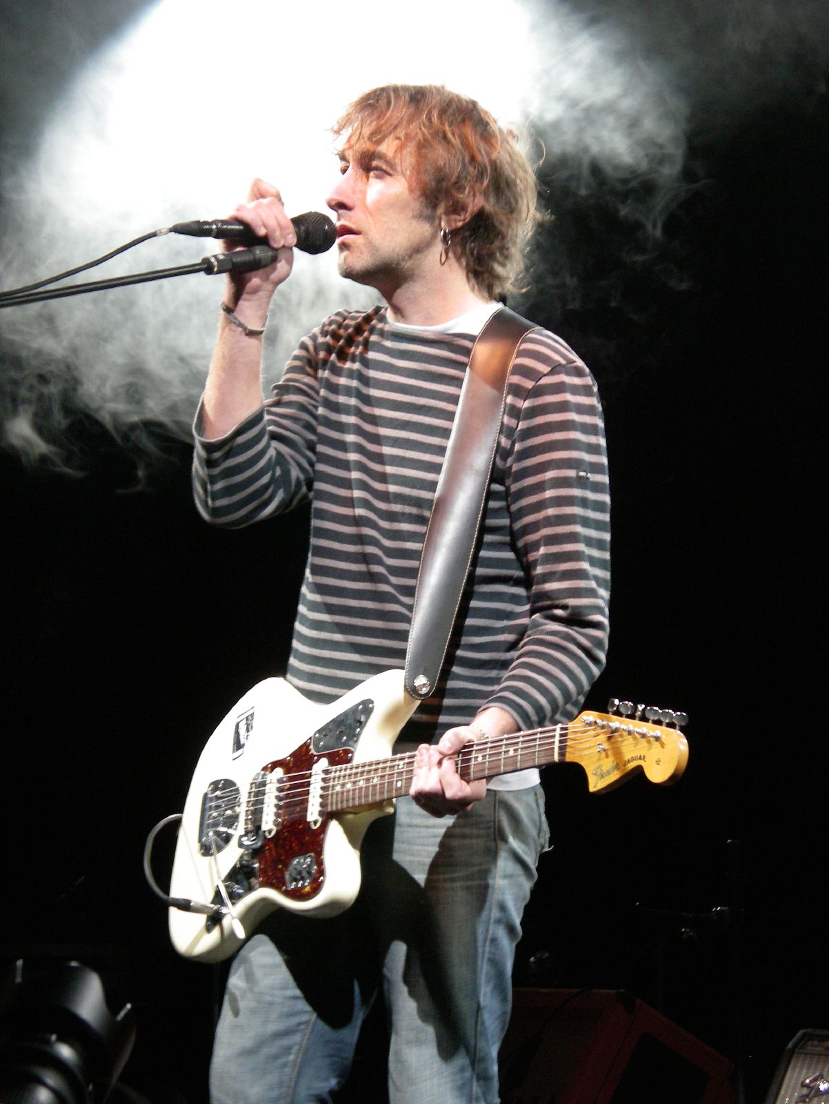 Yann Tiersen live